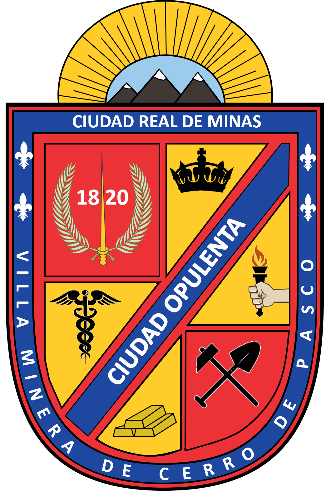 Pasco, Ciudad de Minas, Ciudad Opulenta